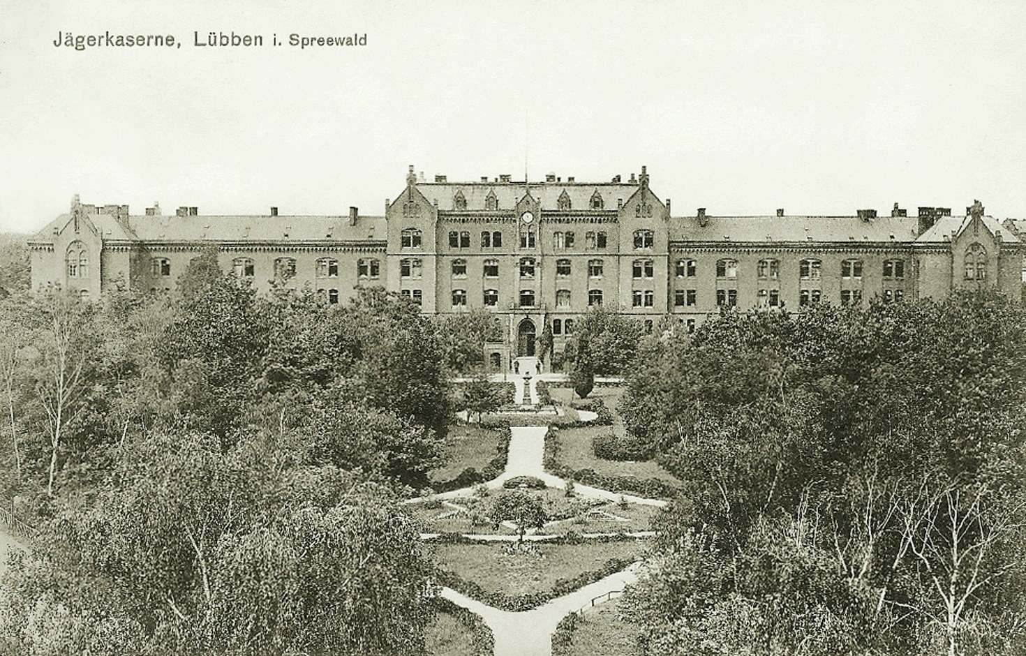 Kasernement des Brandenburgisches Jäger-Bataillons Nr. 3 in Lübben i. Spreewald.